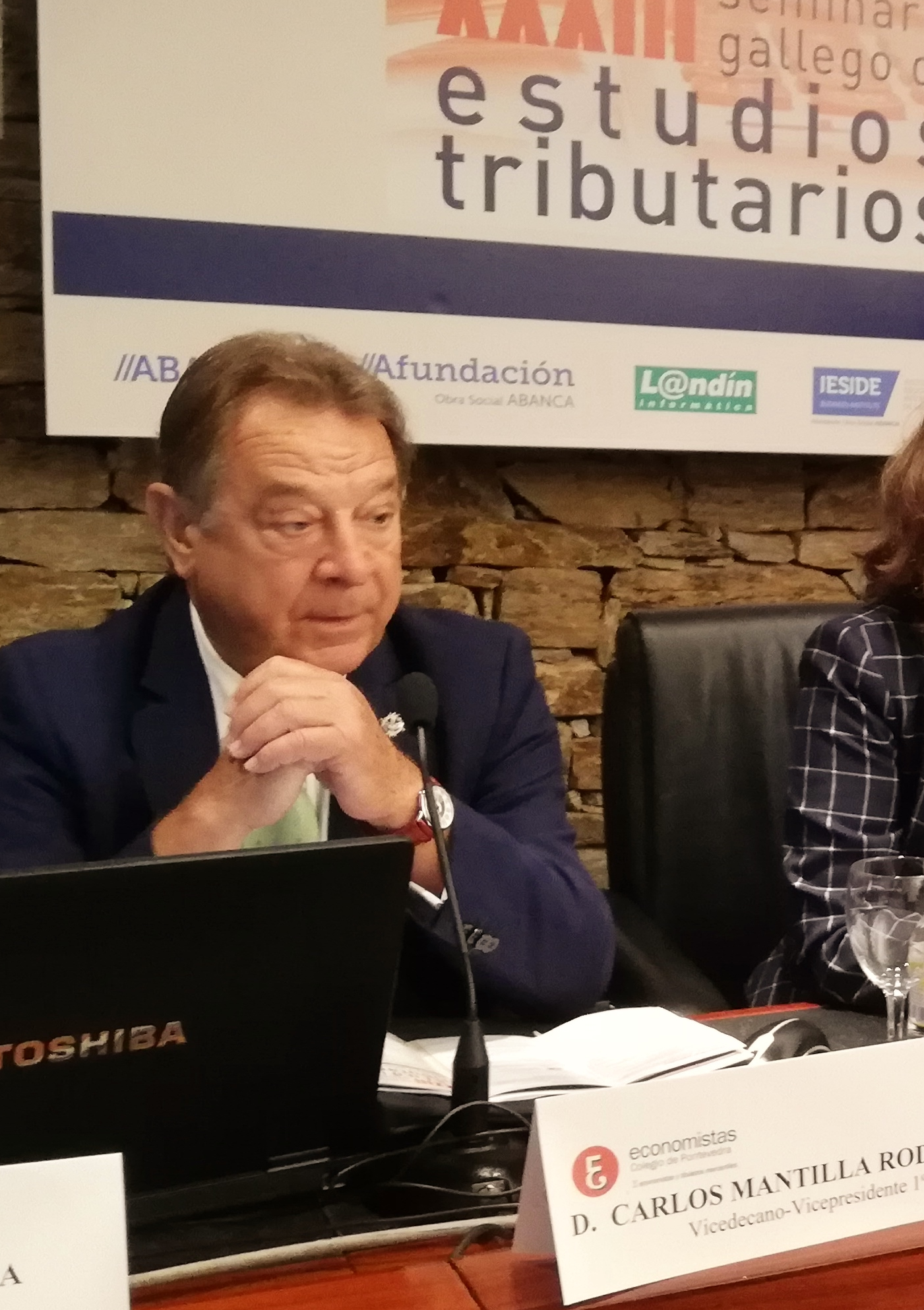 Economista, xurista, auditor de contas e político español